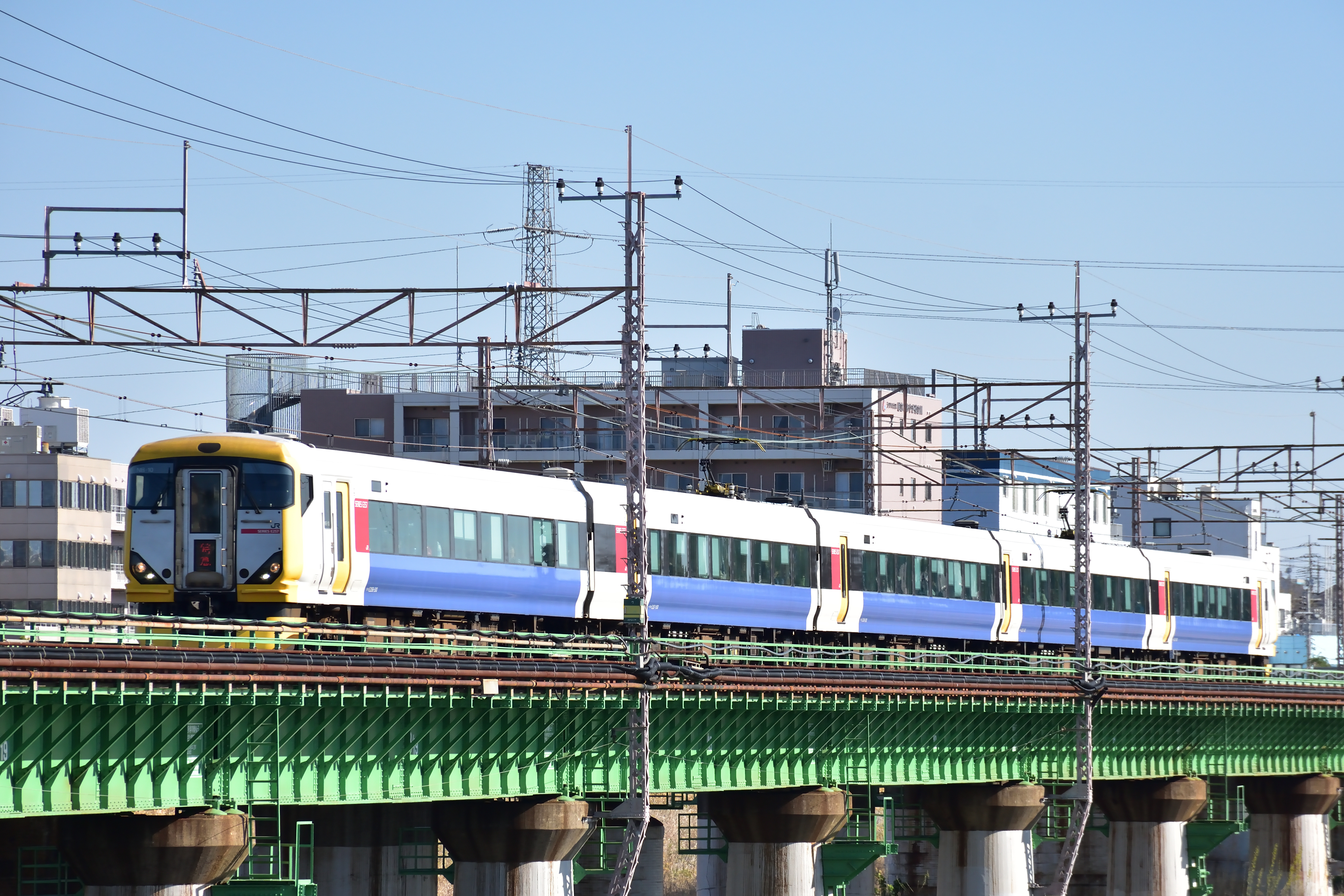 特急富士回遊に充当されるE257系500番台NB-10編成＠中央本線立川～日野（多摩川橋梁）